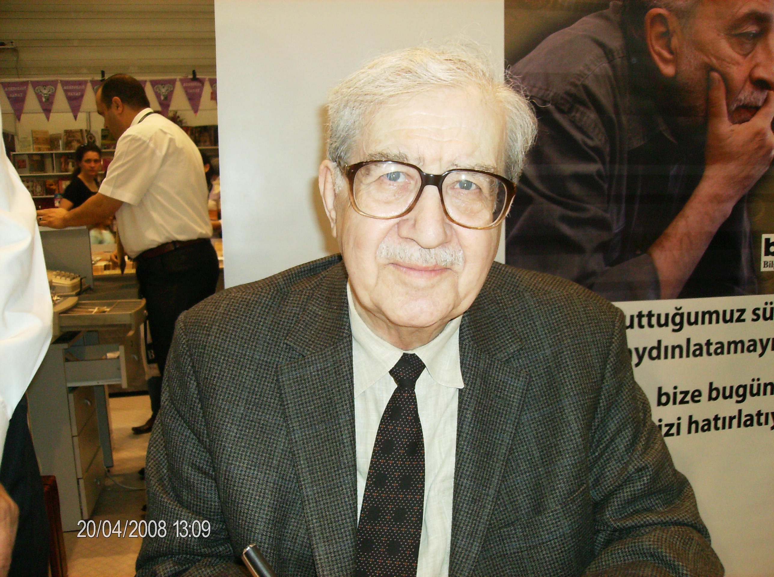 kendi çekimim 13. izmir kitap fuarı